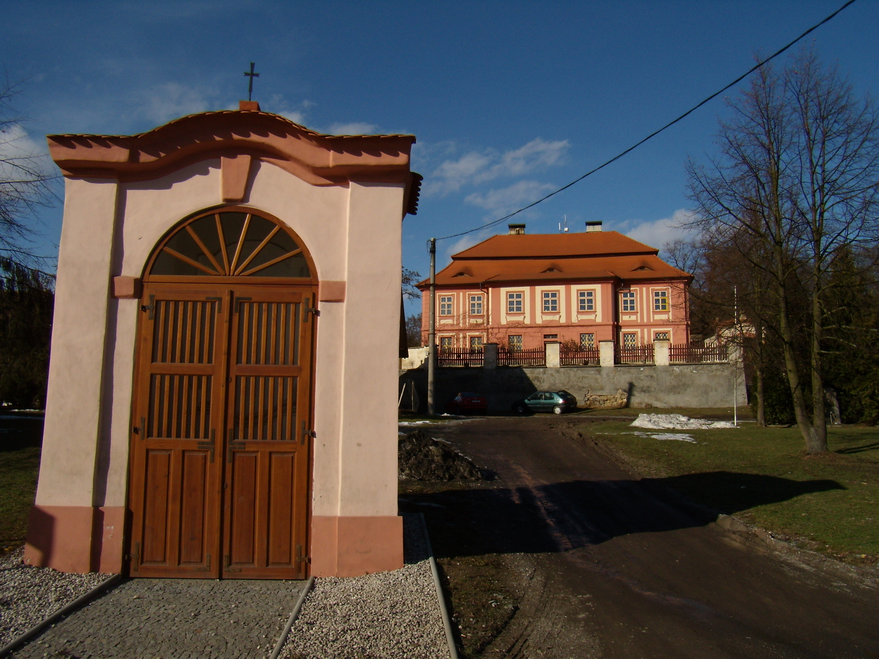 Vejprnice - kaplička a fara